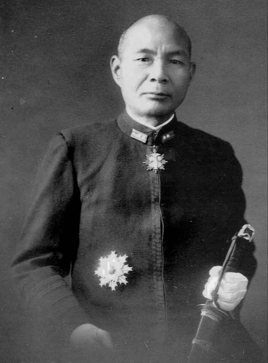 Japanese admiral Ugaki Matome